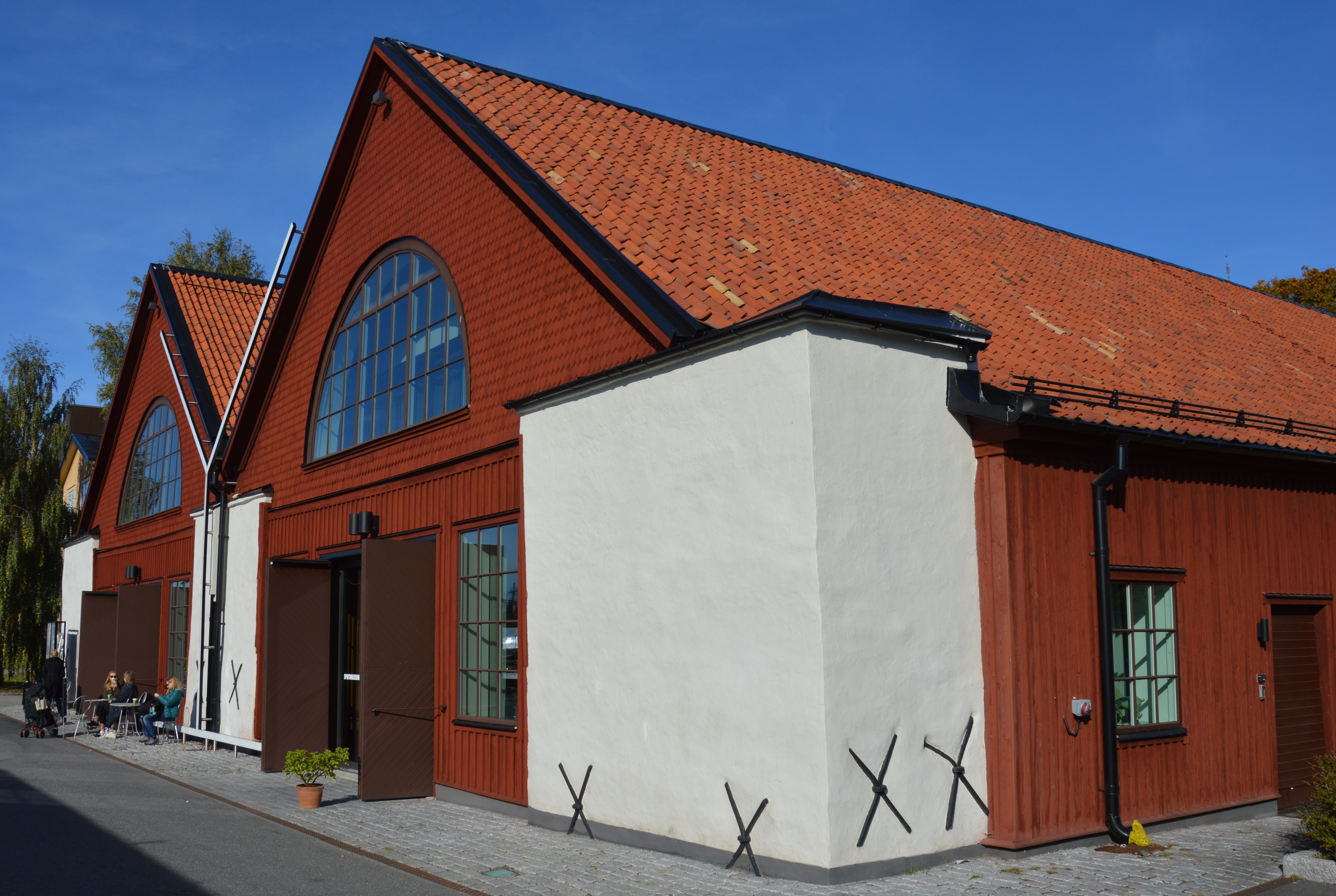 Spritmuseum Stockholm